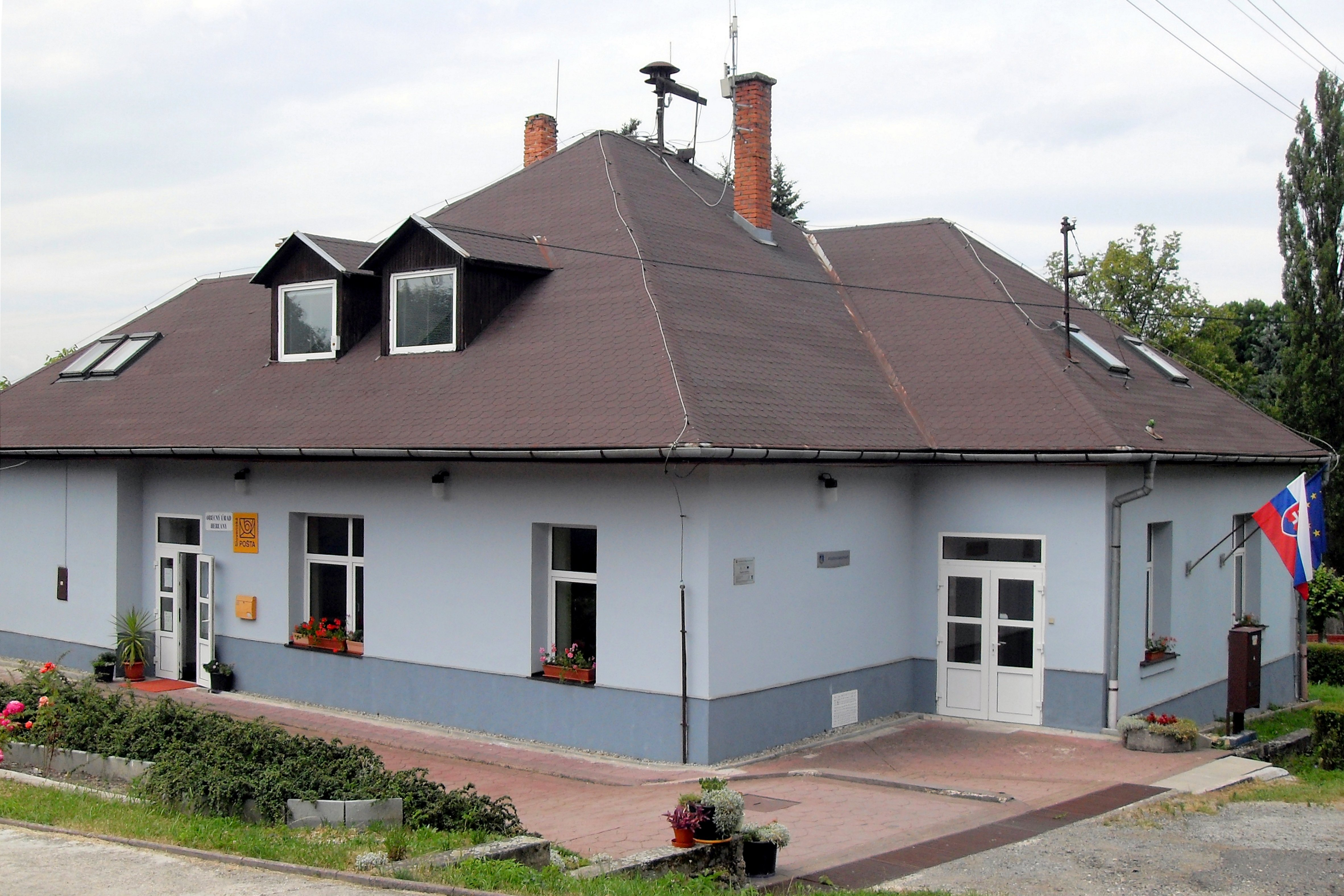 Obecný úrad a pošta v Herľany